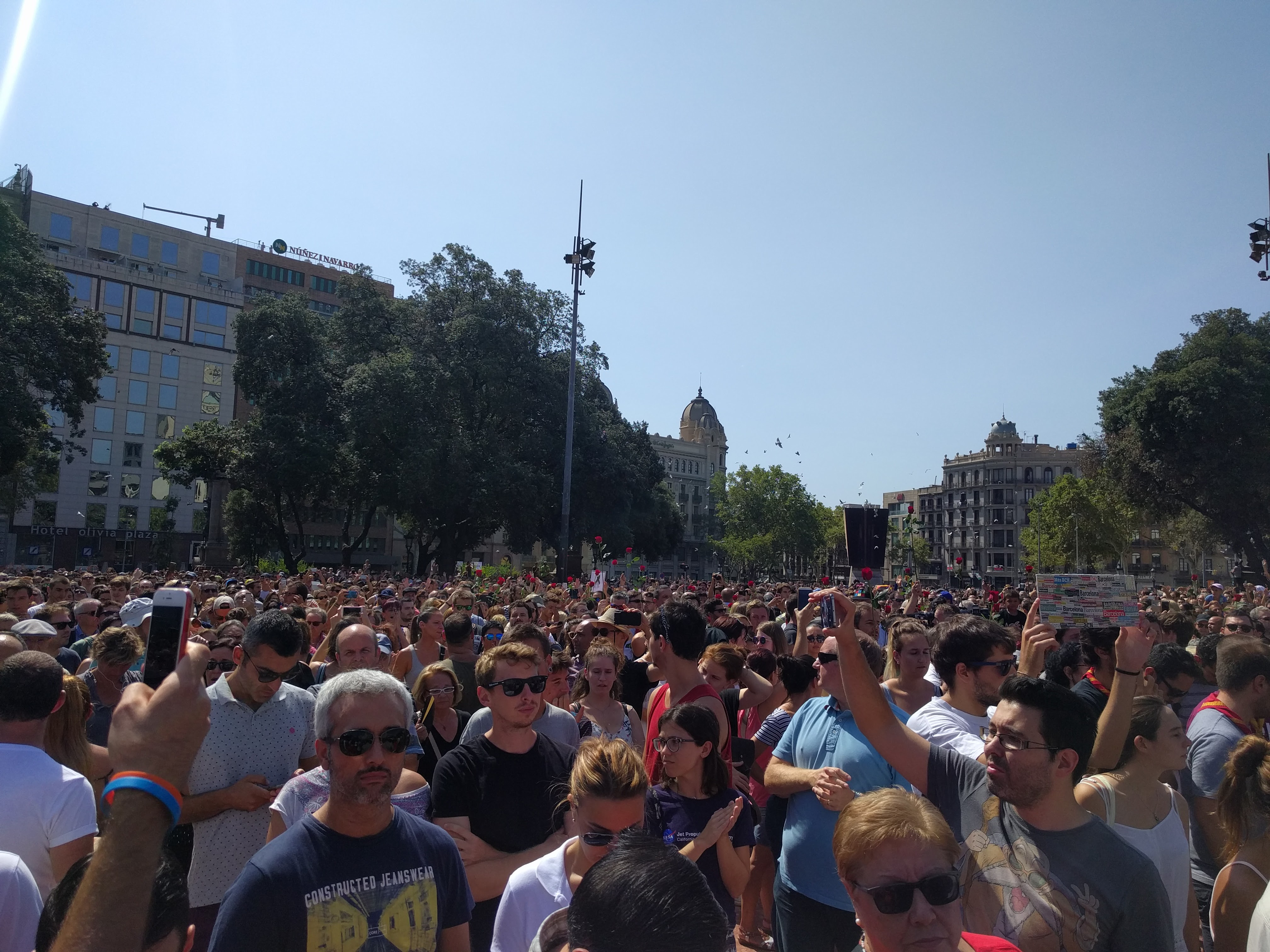 Flors entre els assistents al minut de silenci a Plaça Catalunya del 18 d'agost de 2016.